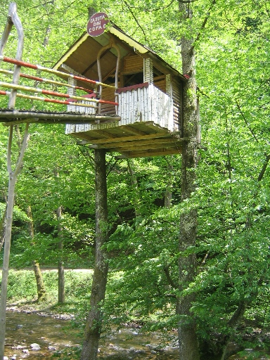 Căsuțe suspendate la Nădrag